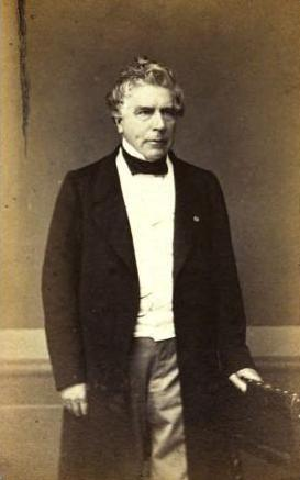 "Ch. Rogier, Président d'honneur de l'Association internationale pour le progrès des sciences sociales, etc., etc. (décédé le 19 juillet 1863)"